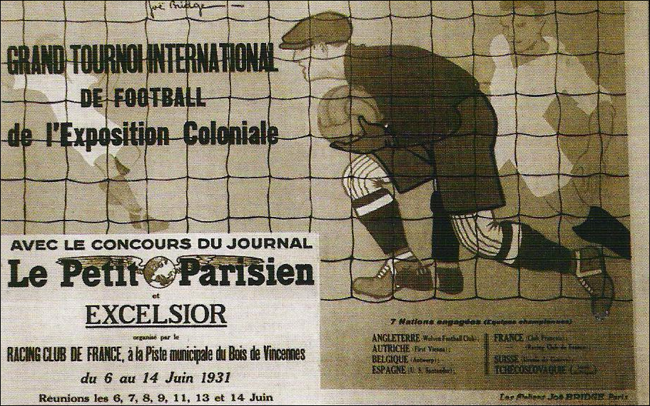 Cartel del Torneo Internacional de París. Competición futbolística internacional de carácter amistoso celebrada del 6 al 14 de junio de 1931, con motivo de la exposición colonial de Vincennes, París (Francia).